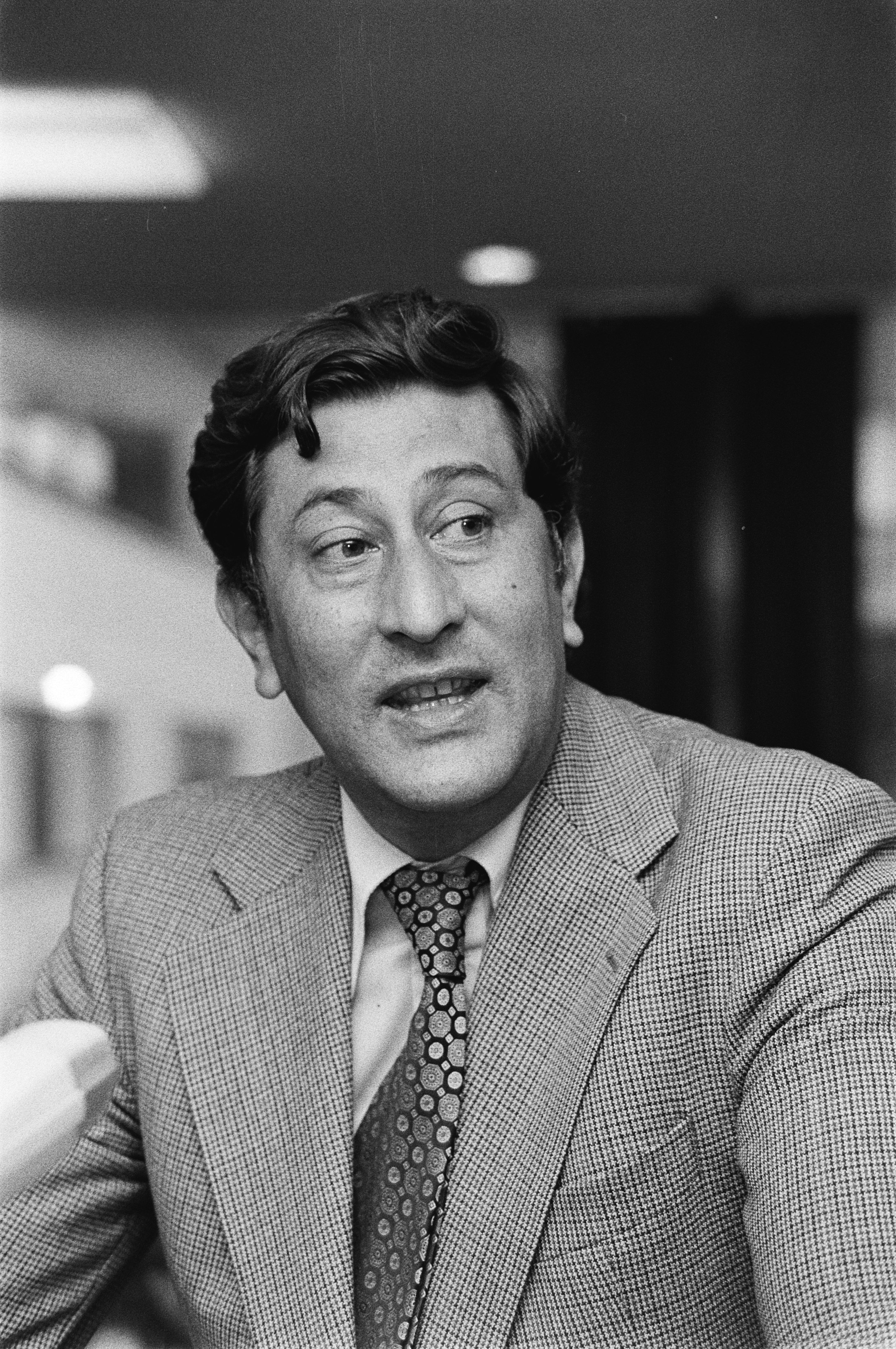 Collectie / Archief : Fotocollectie Anefo Reportage / Serie : CAO voor contractspelers in het betaald voetbal ondertekend Beschrijving : Staatssecretaris Wallis de Vries (CRM) Datum : 11 juli 1979 Locatie : Rijswijk, Zuid-Holland Trefwoorden : cao's, portretten, staatssecretarissen, voetbal Persoonsnaam : Wallis de Vries, G.C. Fotograaf : Dijk, Hans van / Anefo Auteursrechthebbende : Nationaal Archief Materiaalsoort : Negatief (zwart/wit) Nummer archiefinventaris : bekijk toegang 2.24.01.05 Bestanddeelnummer : 930-3513